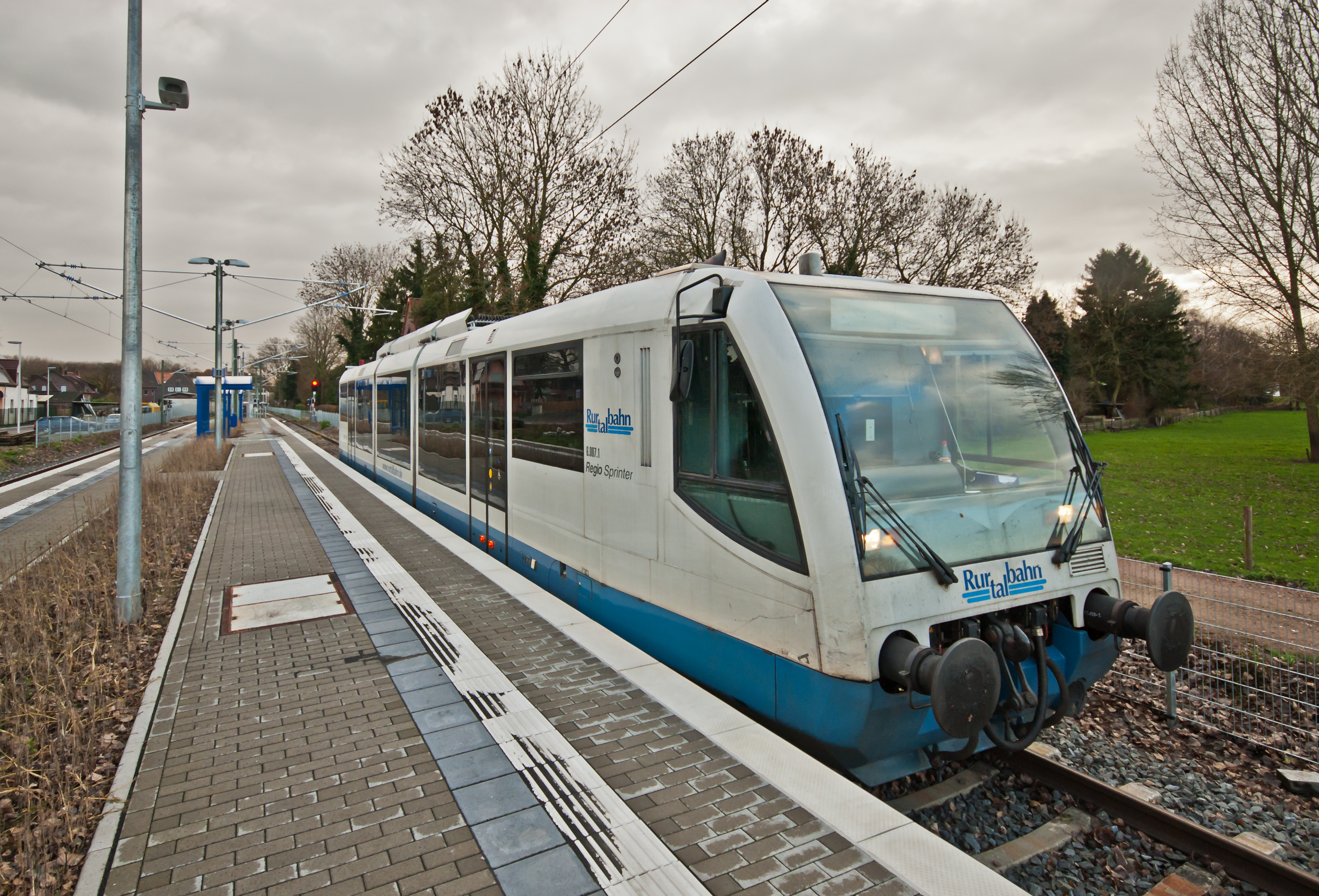 Regiosprinter der Rurtalbahn, aufgenommen während einer Testfahrt im neu gestalteten Bahnhof Oberbruch. Zum Standort des ehemaligen Empfangsgebäude siehe Annotation.